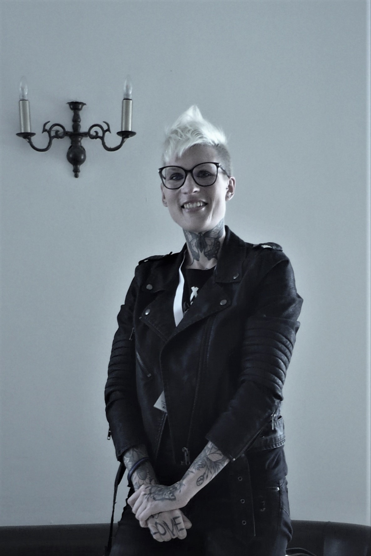 Katarzyna Puzyńska, Festiwal Góry Literatury, Zamek Książ, 14.07.2019